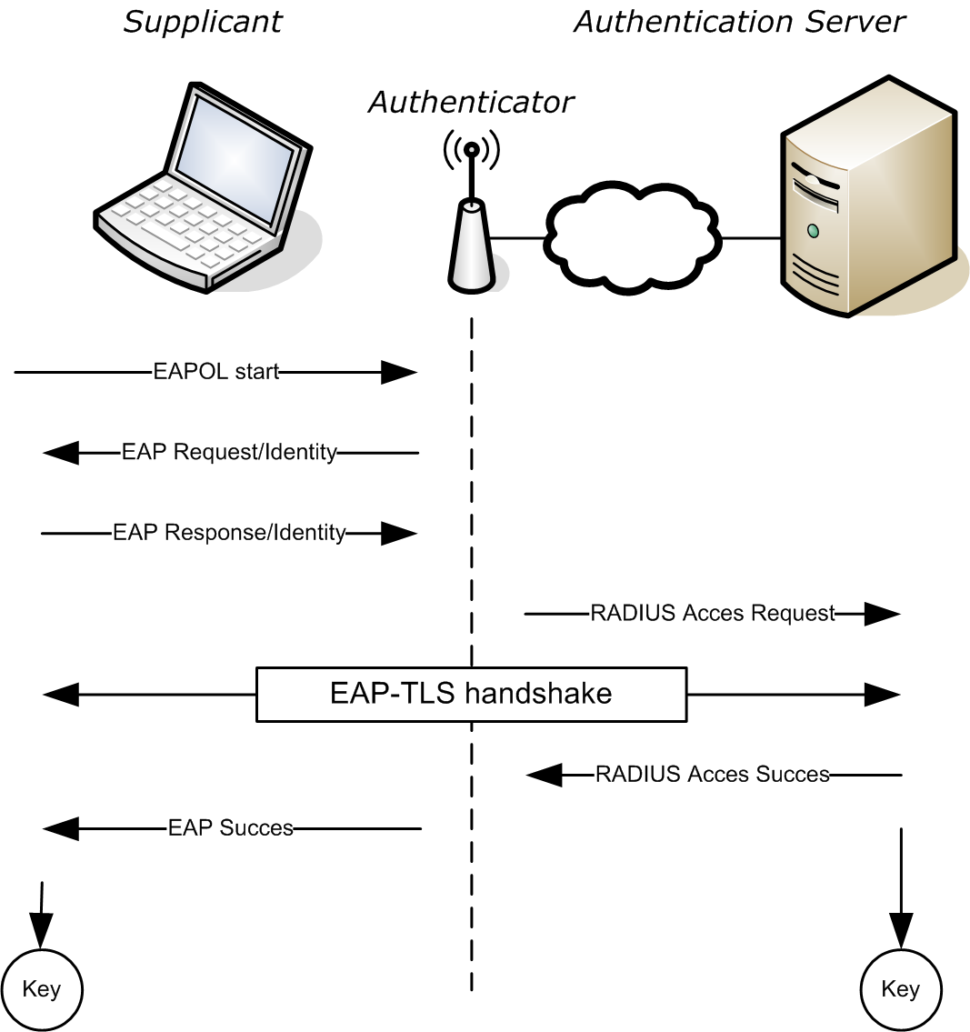 Description: Schematische voorstelling van de EAP handshaking procedure Source: eigen werk Author: Charles Vercauteren